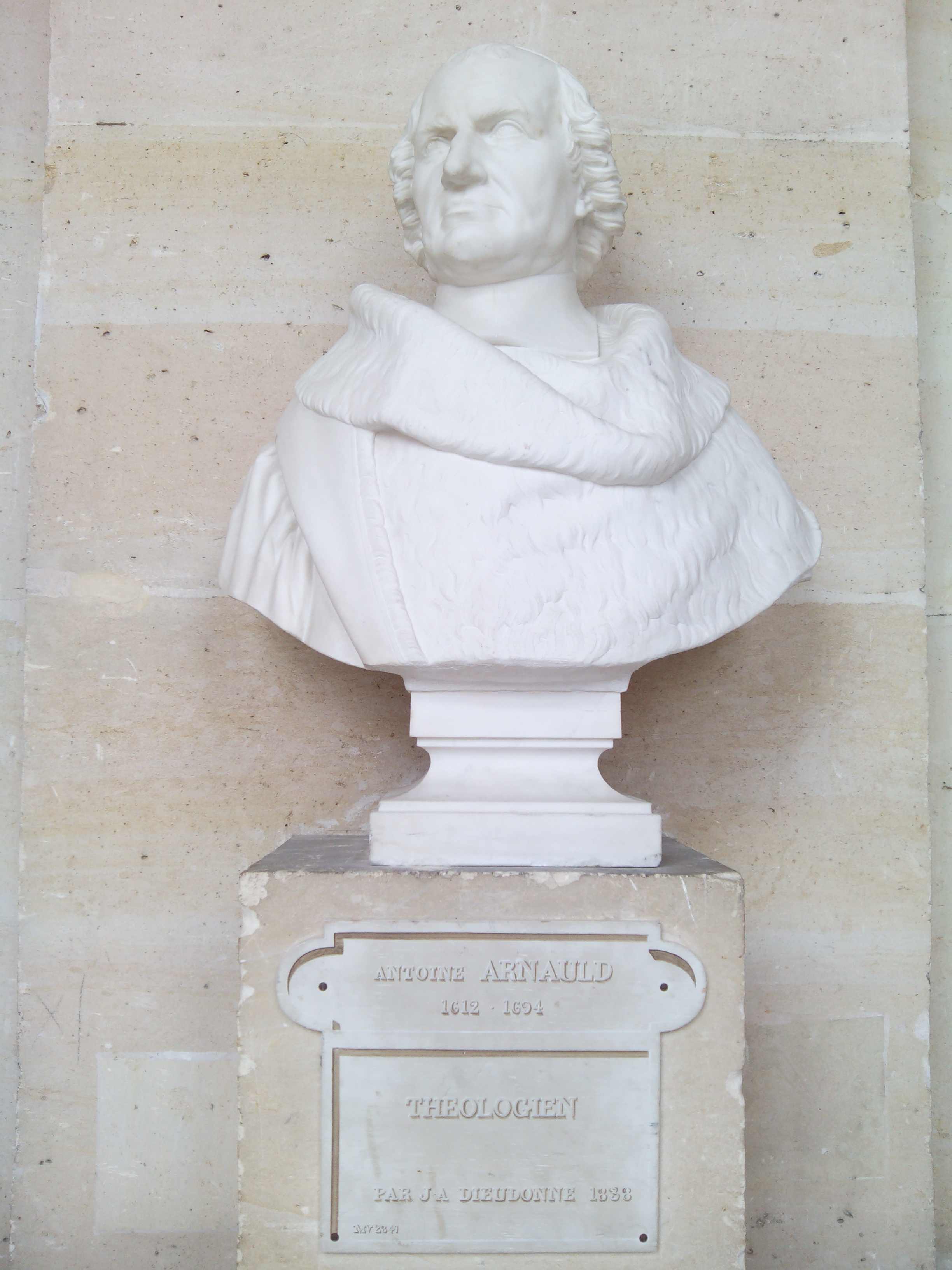 Fotografía realizada en el palacio de Versalles, agosto de 2014